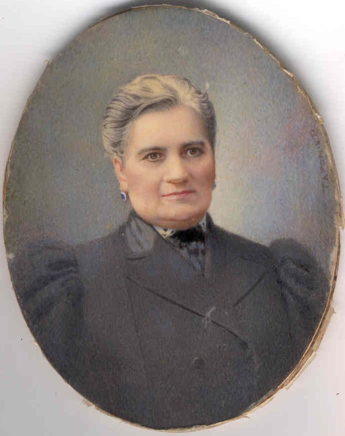 Fotografía de un retrato de Da. Vicenta Iturraspe c 1890.